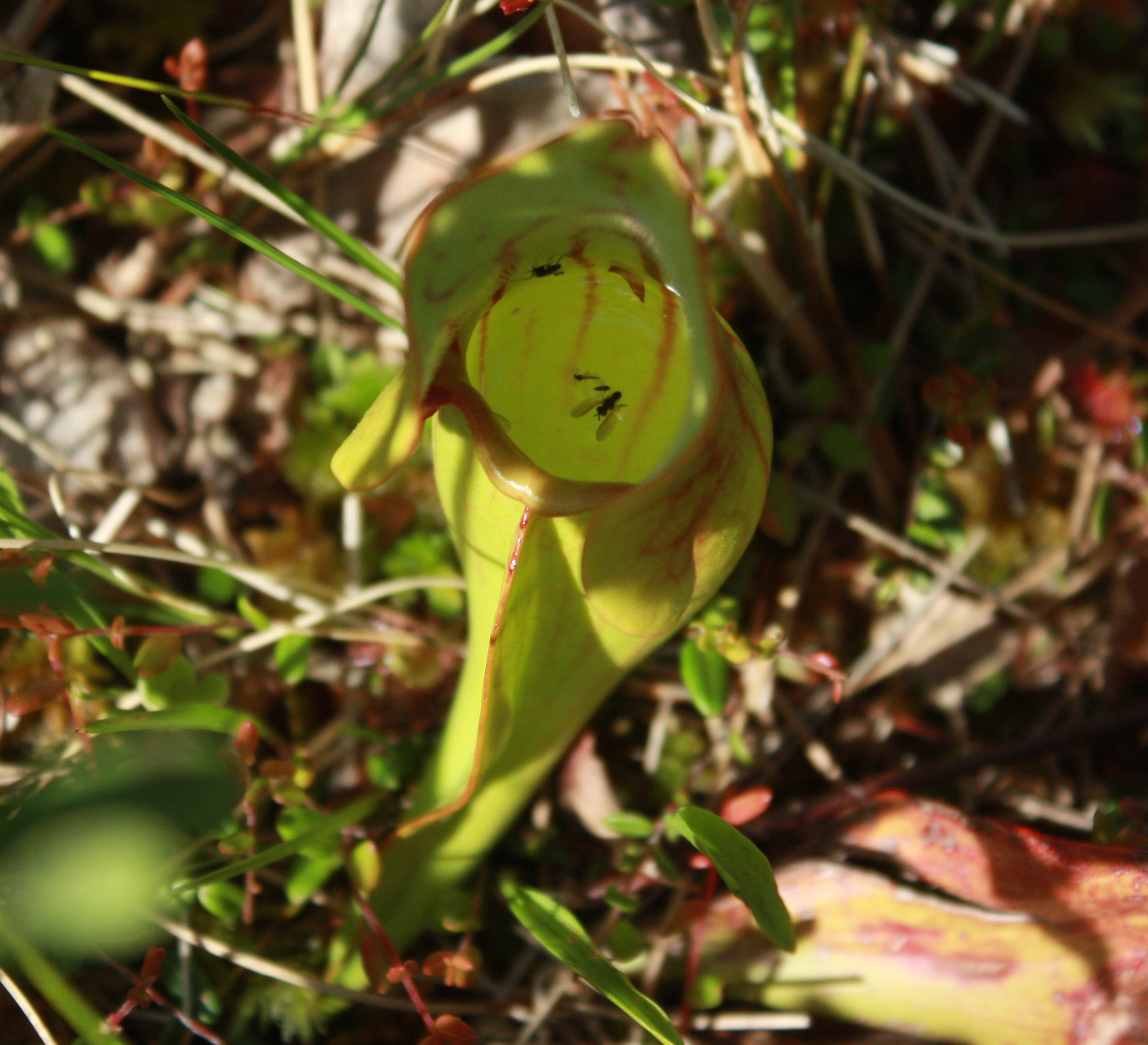 Feuille de sarracénie pourpre (Sarracenia purpurea) vue de dessus, montrant les proies qui flottent encore à la surface du liquide. Photo prise dans un fen de bassin situé entre Saint-Fabien et Le Bic, au Bas-Saint-Laurent, au Bas-Saint-Laurent (Québec).